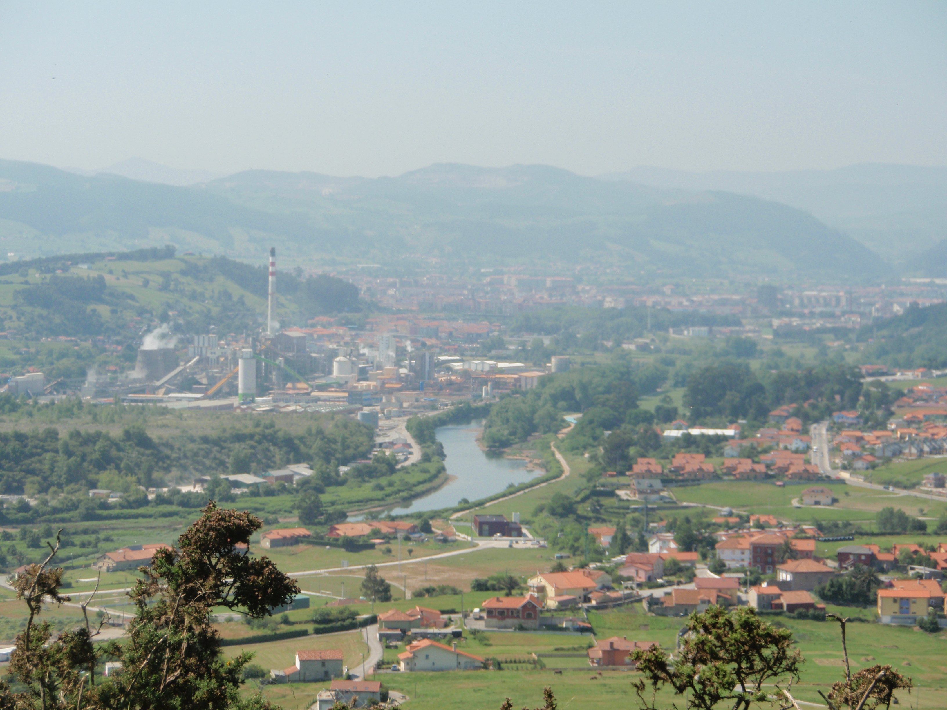 Vista panorámica de la empresa Solvay (Cantabria) desde el monte La Masera.